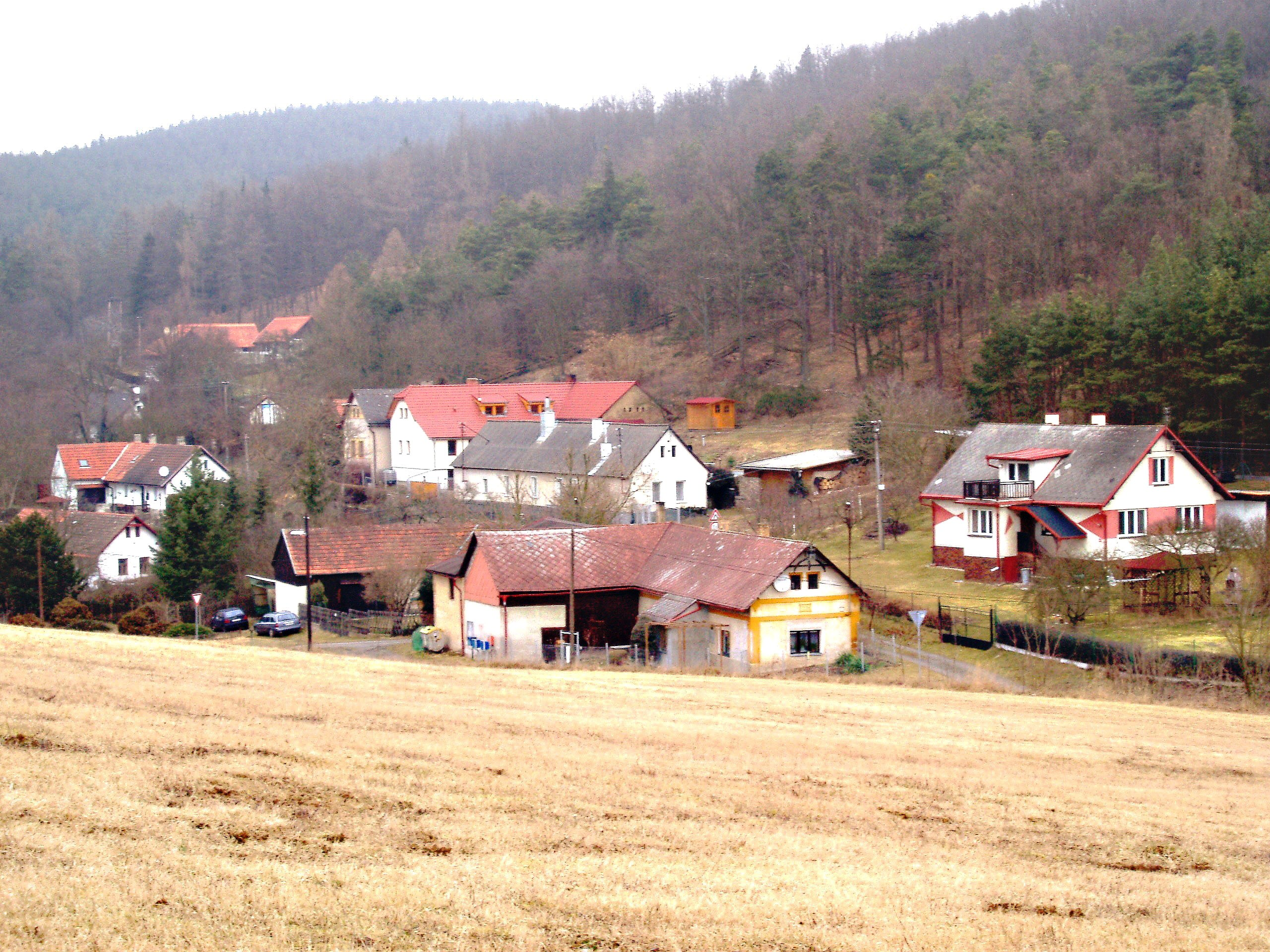 Větrov u Solenic